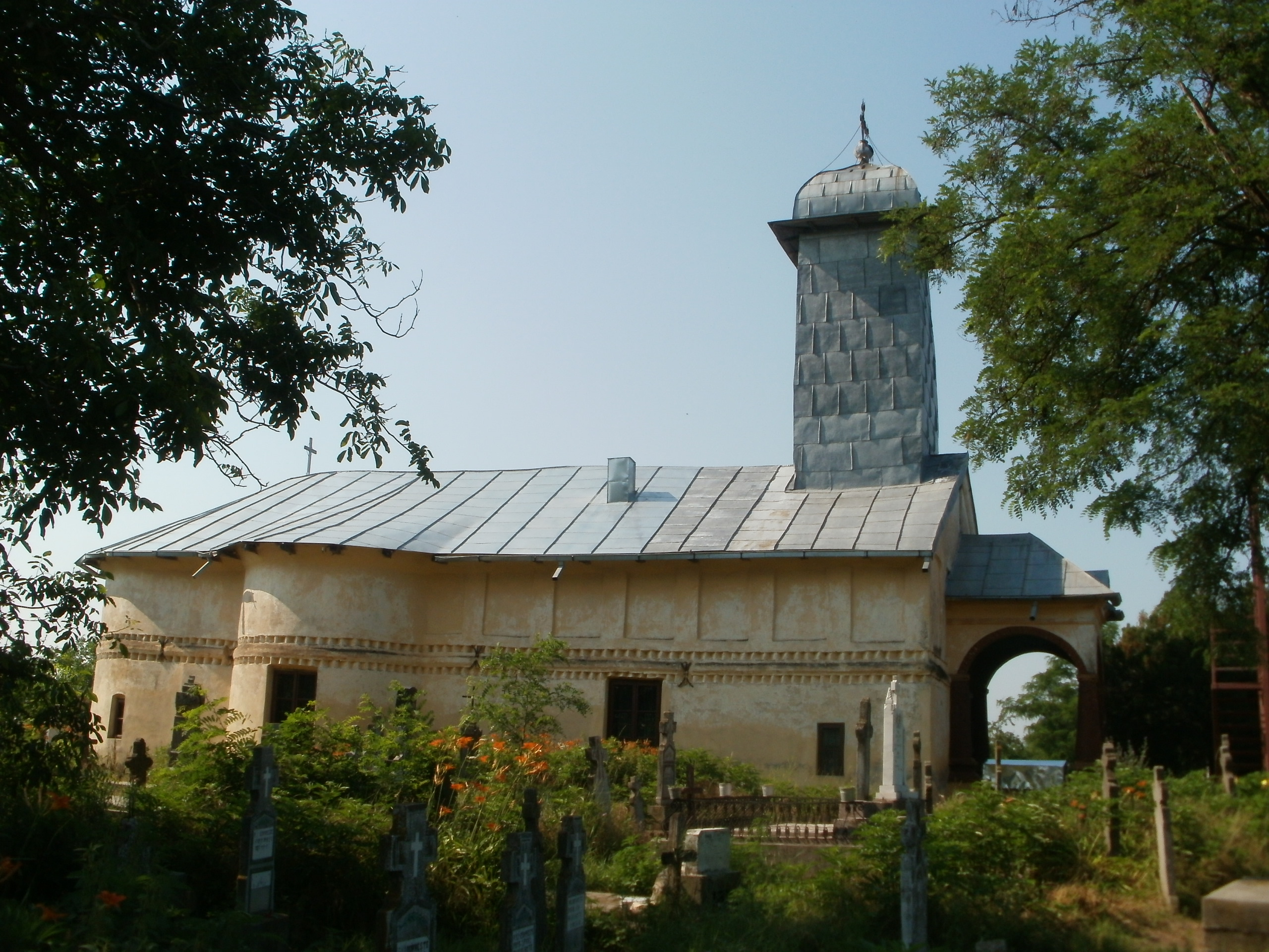 Biserica "Adormirea Maicii Domnului"